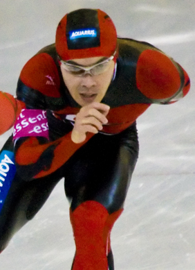 Team Japan Team Pursuit. Hiroki Hirako, Shigeyuki Dejima, Teruhiro Sugimori